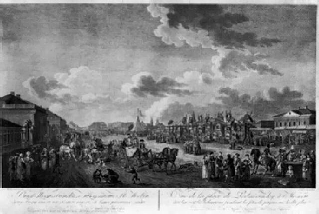 Vue de la Place de Podnovinsky à Moscou nach Guerard de la Barthe, Medium Etching Größe 15,2 x 26,3 in. / 38,7 x 66,7 cm. Jahr